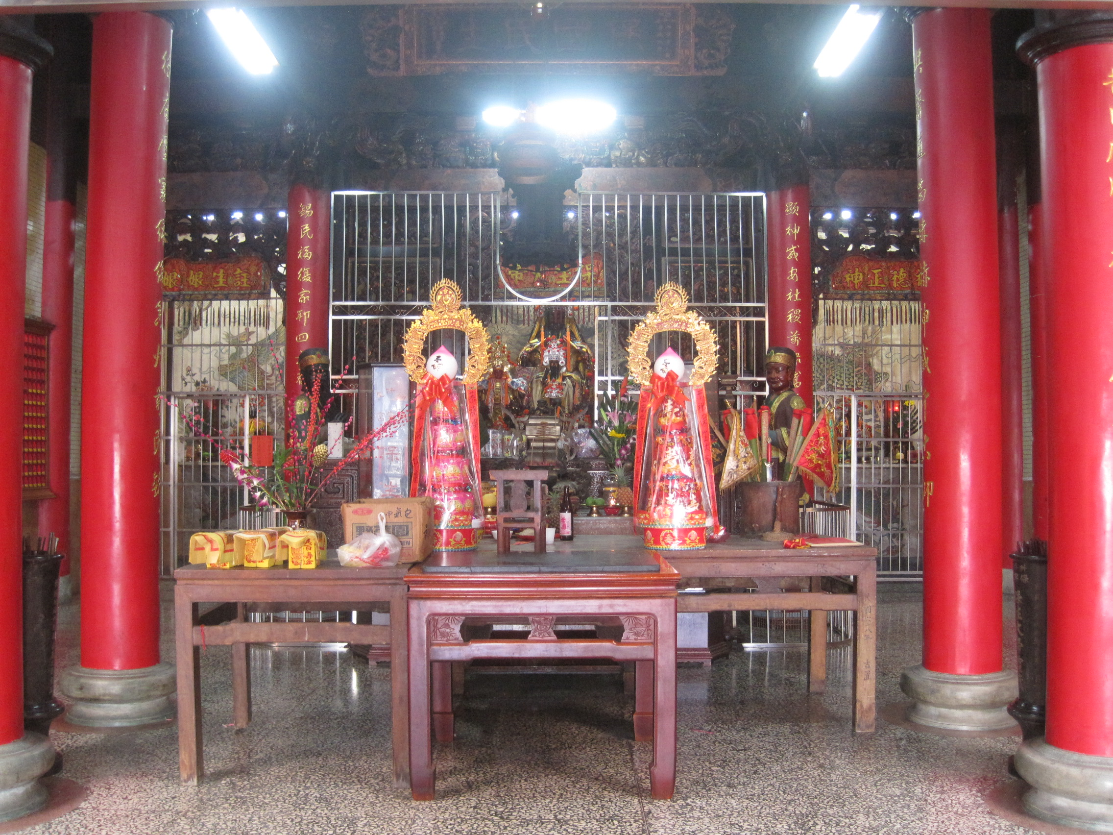 洲仔尾保寧宮正殿